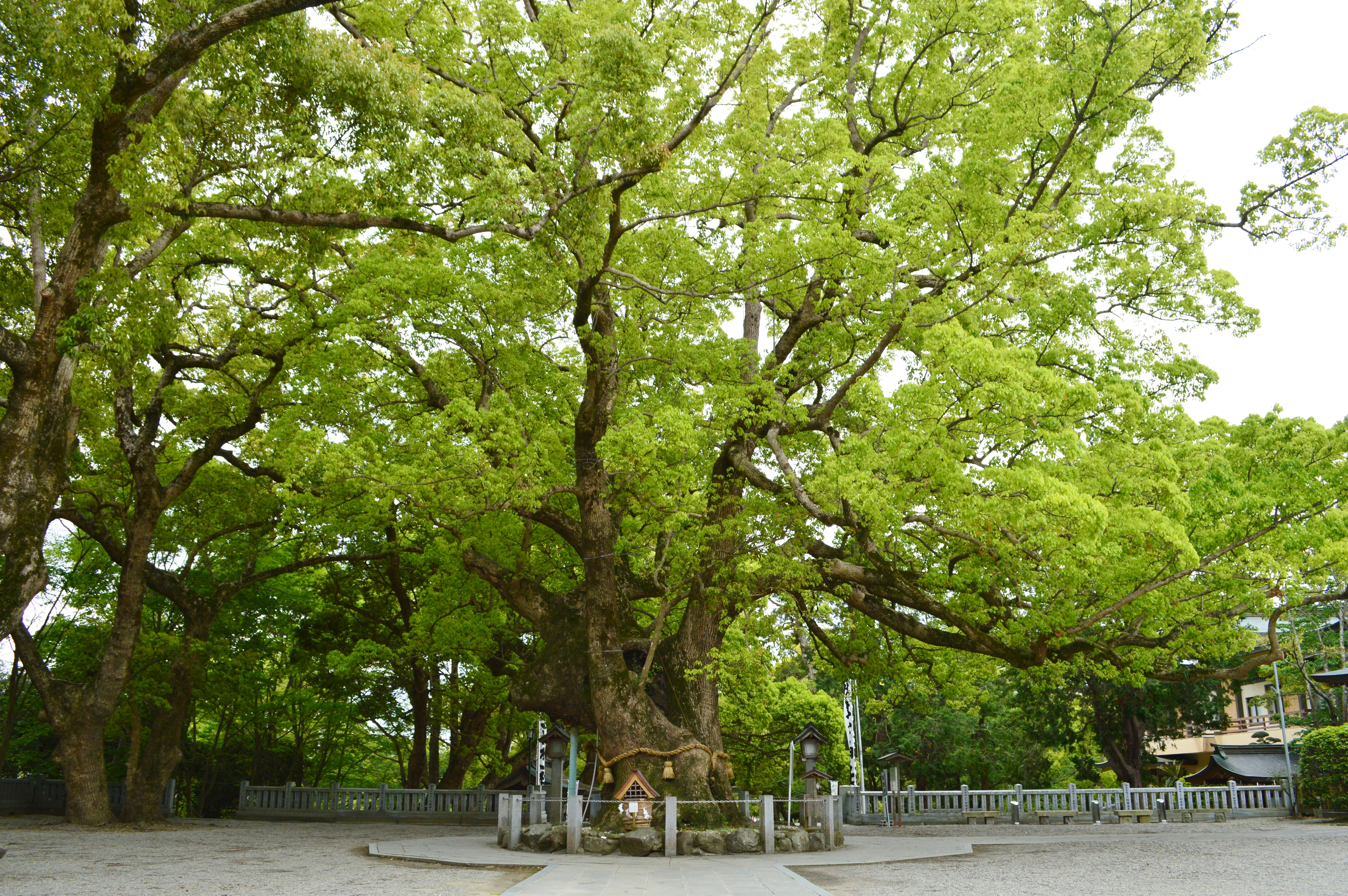 大麻比古神社 クス Nikon D3200